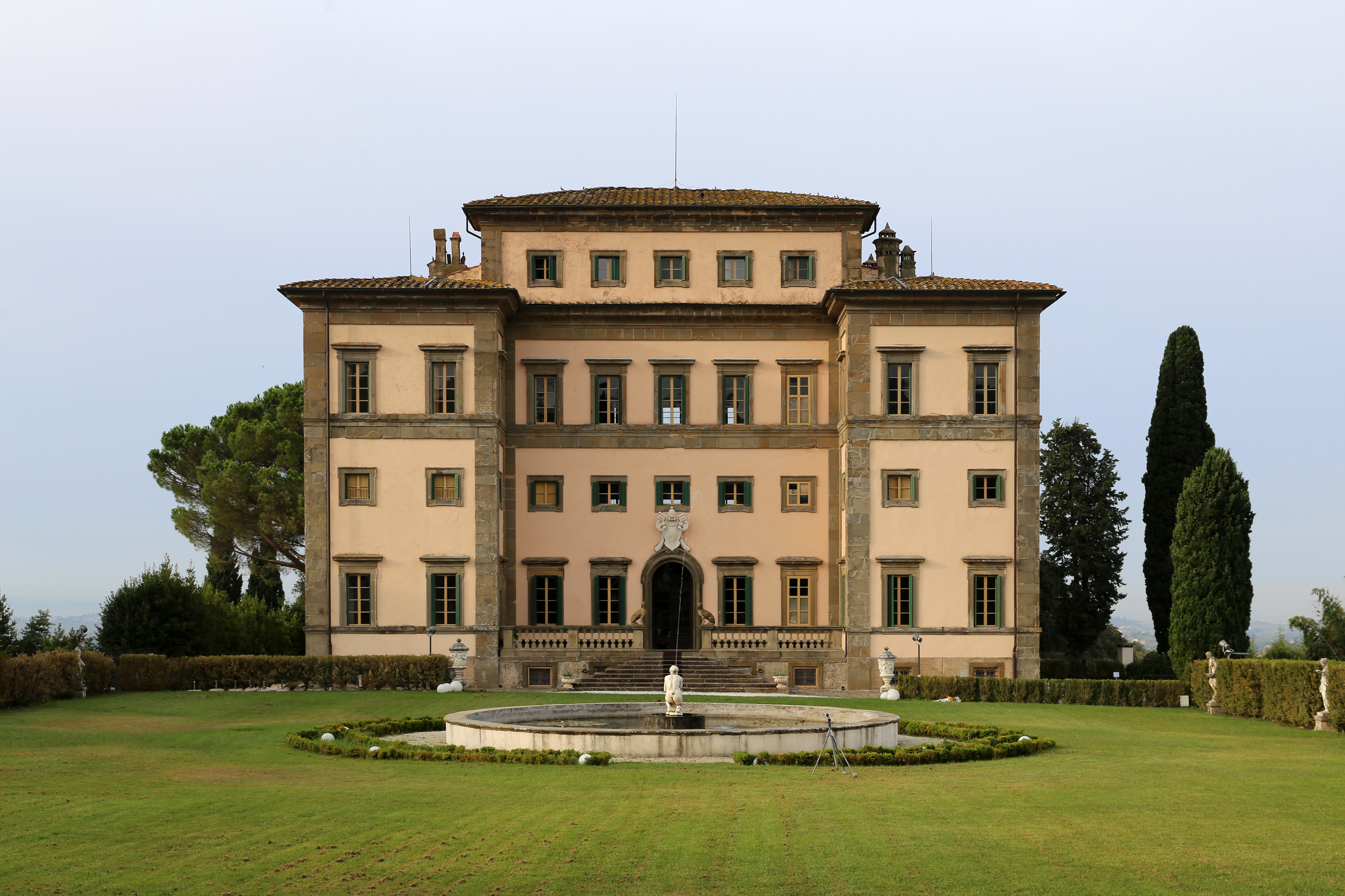 Villa Rospigliosi This is a photo of a monument which is part of cultural heritage of Italy.